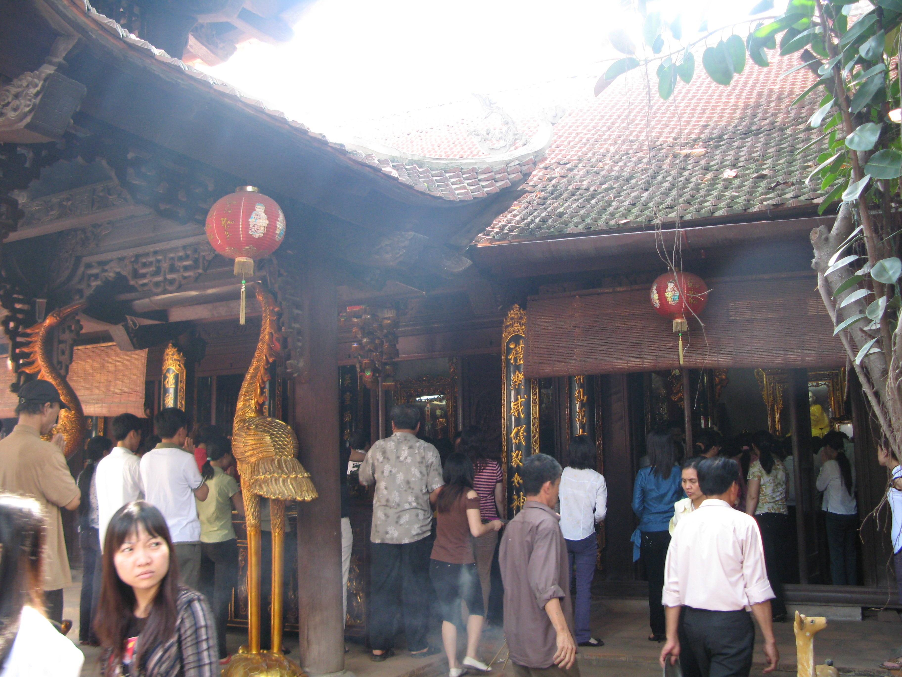 Điện Mẫu thờ Mẫu Liễu Hạnh ngay sau Chùa Hà, Hà Nội.